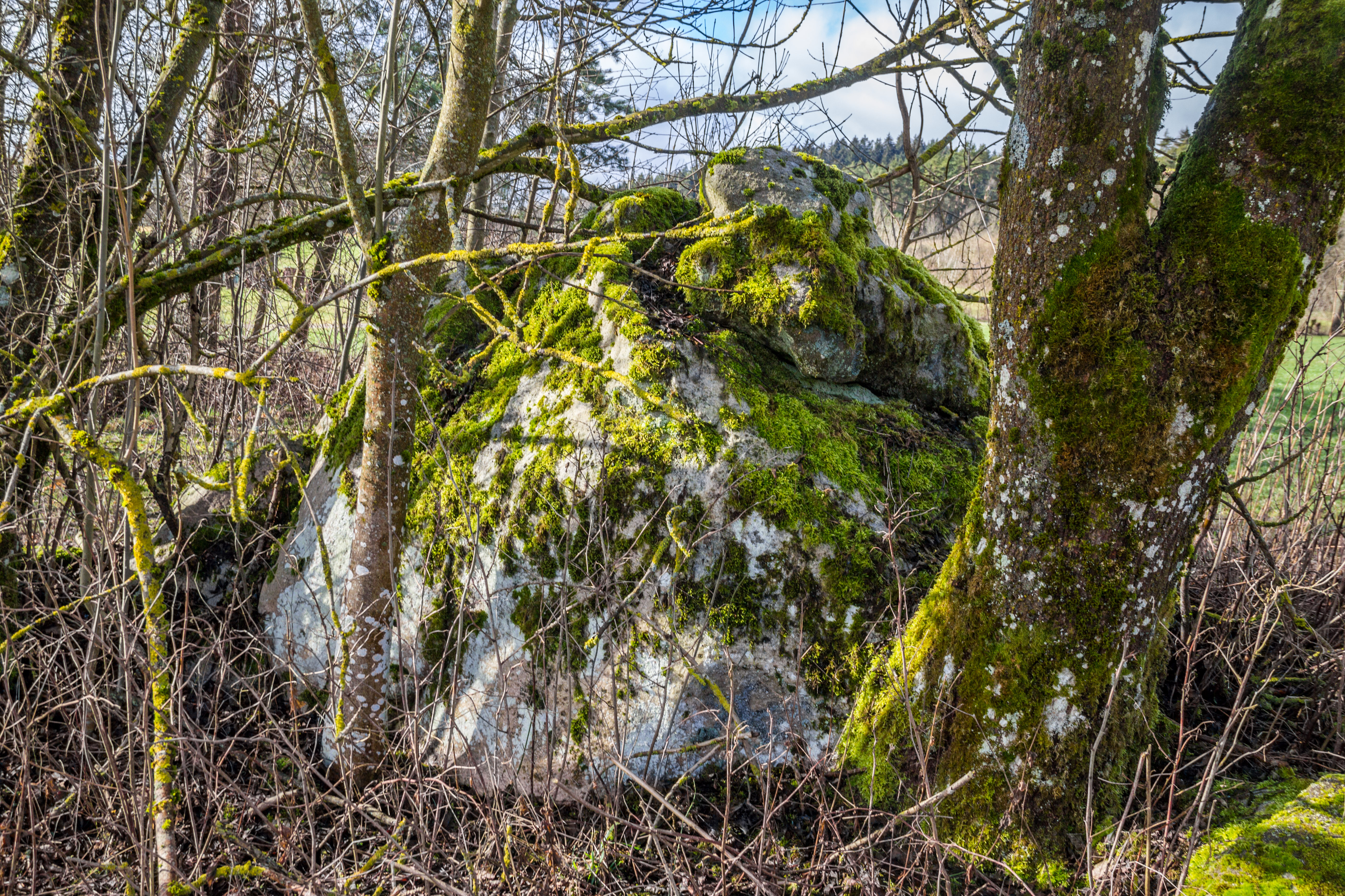 Kallmünzer, Steinbach, Geotop